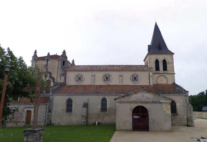 église de mios